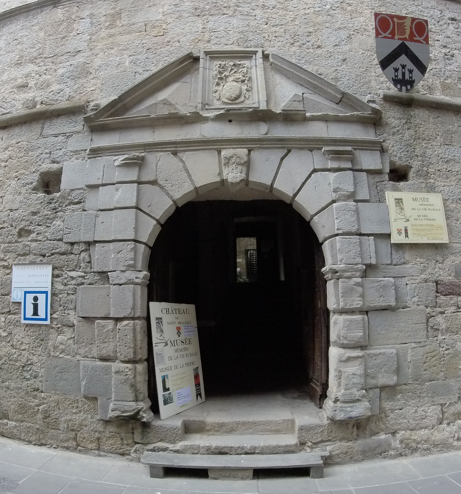 Porte du château de Saint-Beauzély